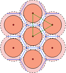 Autor: C. Breßler Bildquelle: eigene Zeichnung Lizenzstatus: GNU-FDL